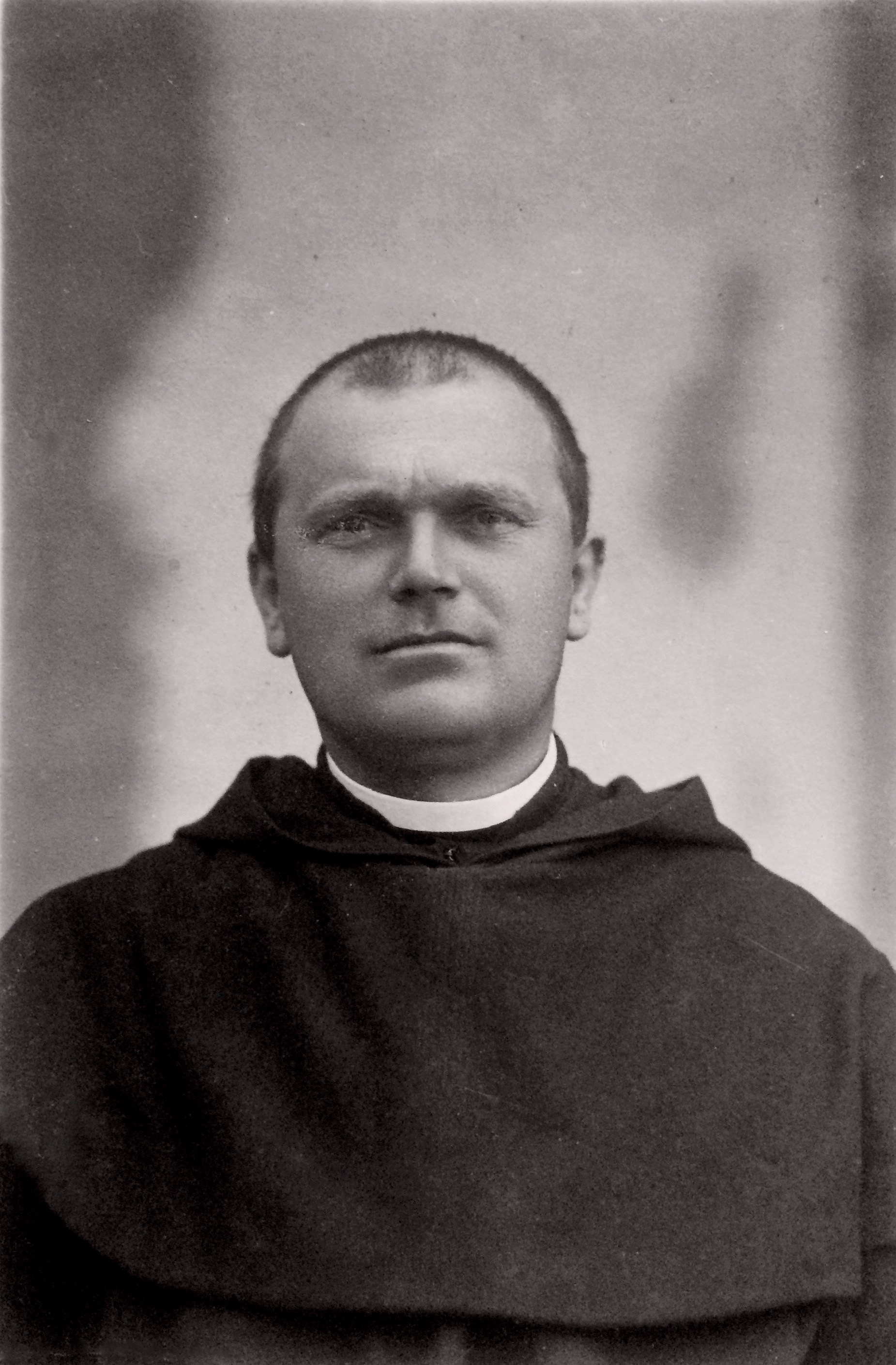 Anacleto Milani, ordinato sacerdote nel 1909